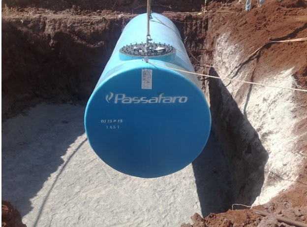 Jacketed tank installation